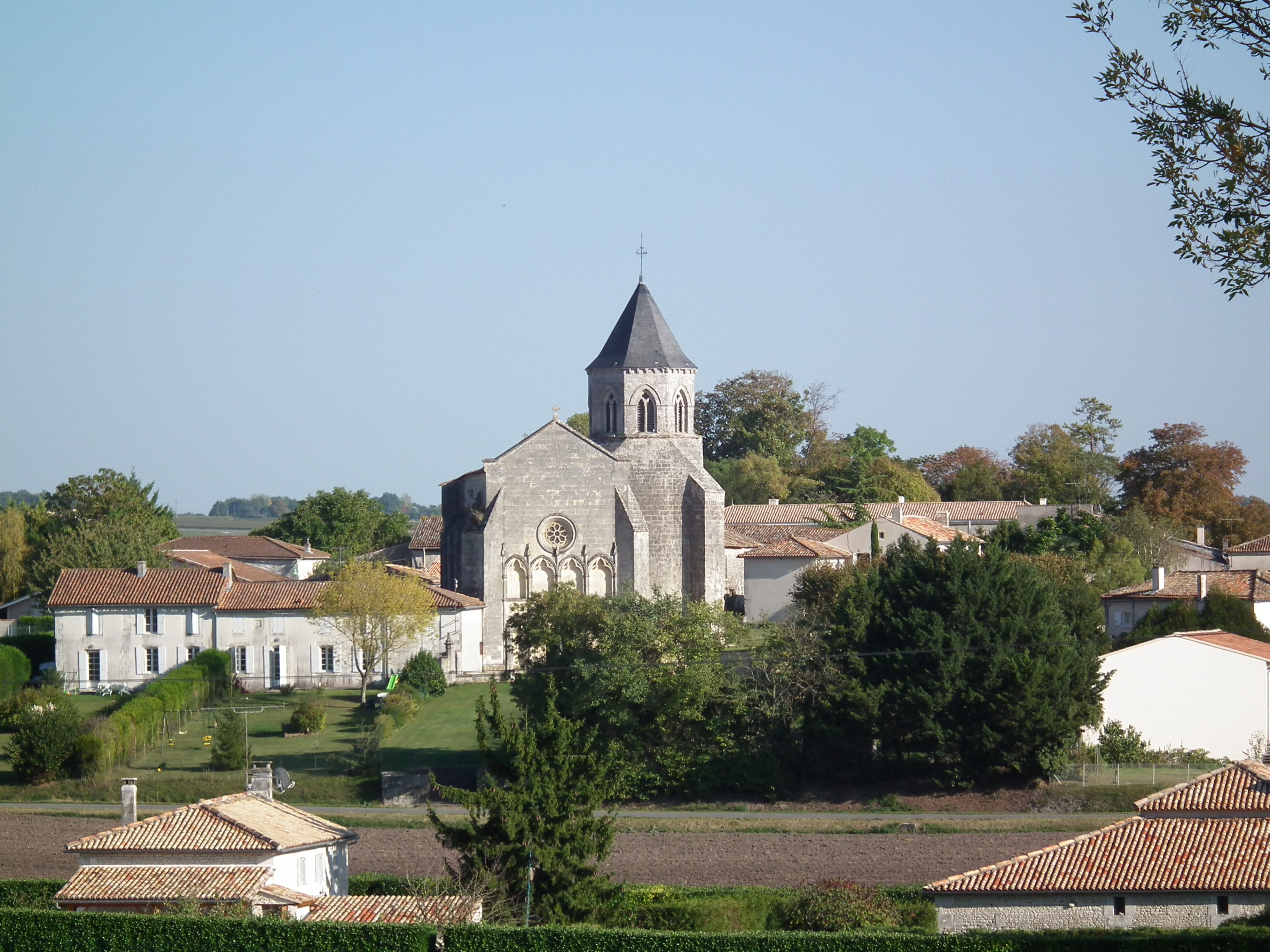 Vue de Champagnac